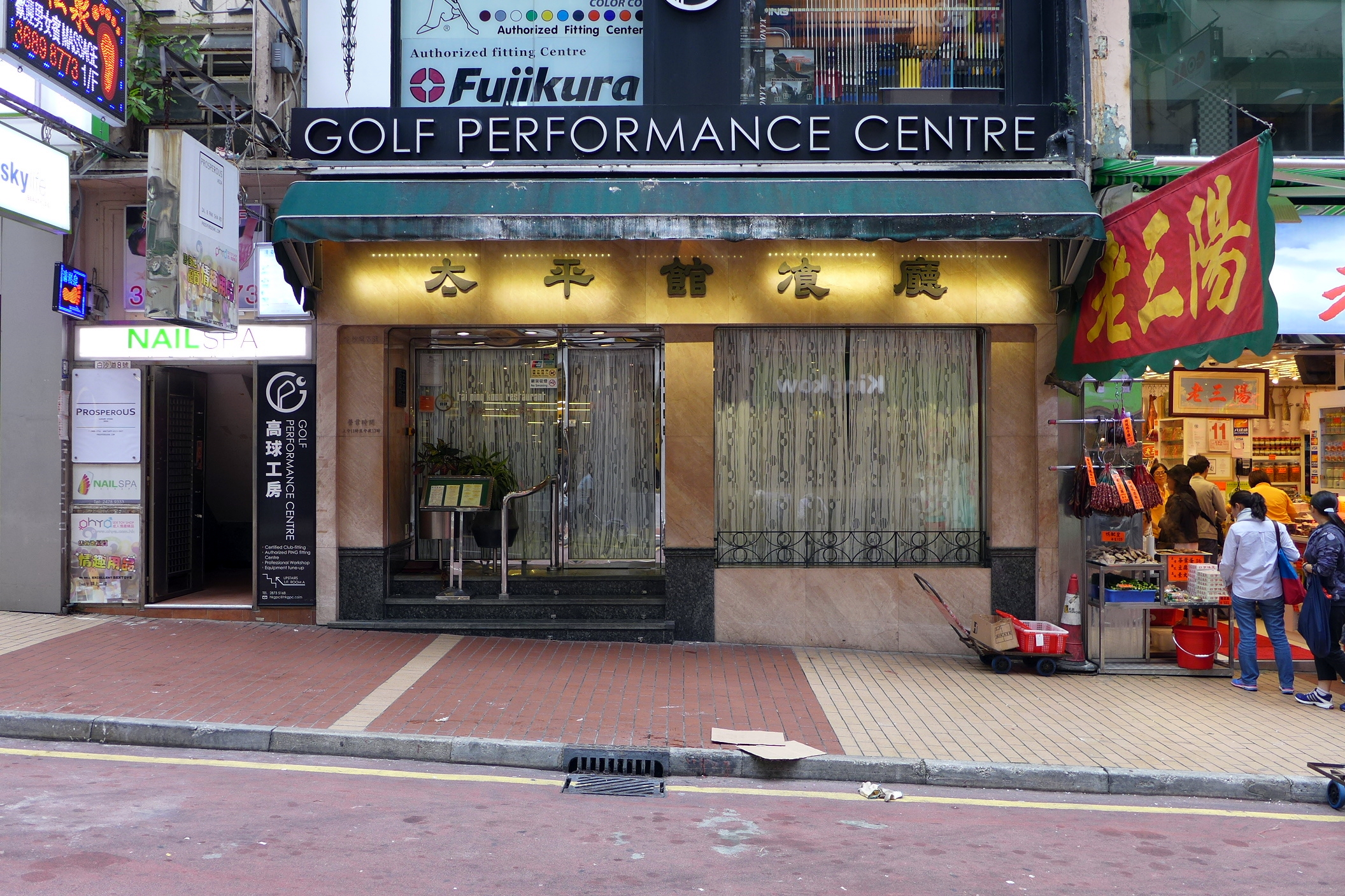 Pak Sha Road Tai Ping Koon Restaurant